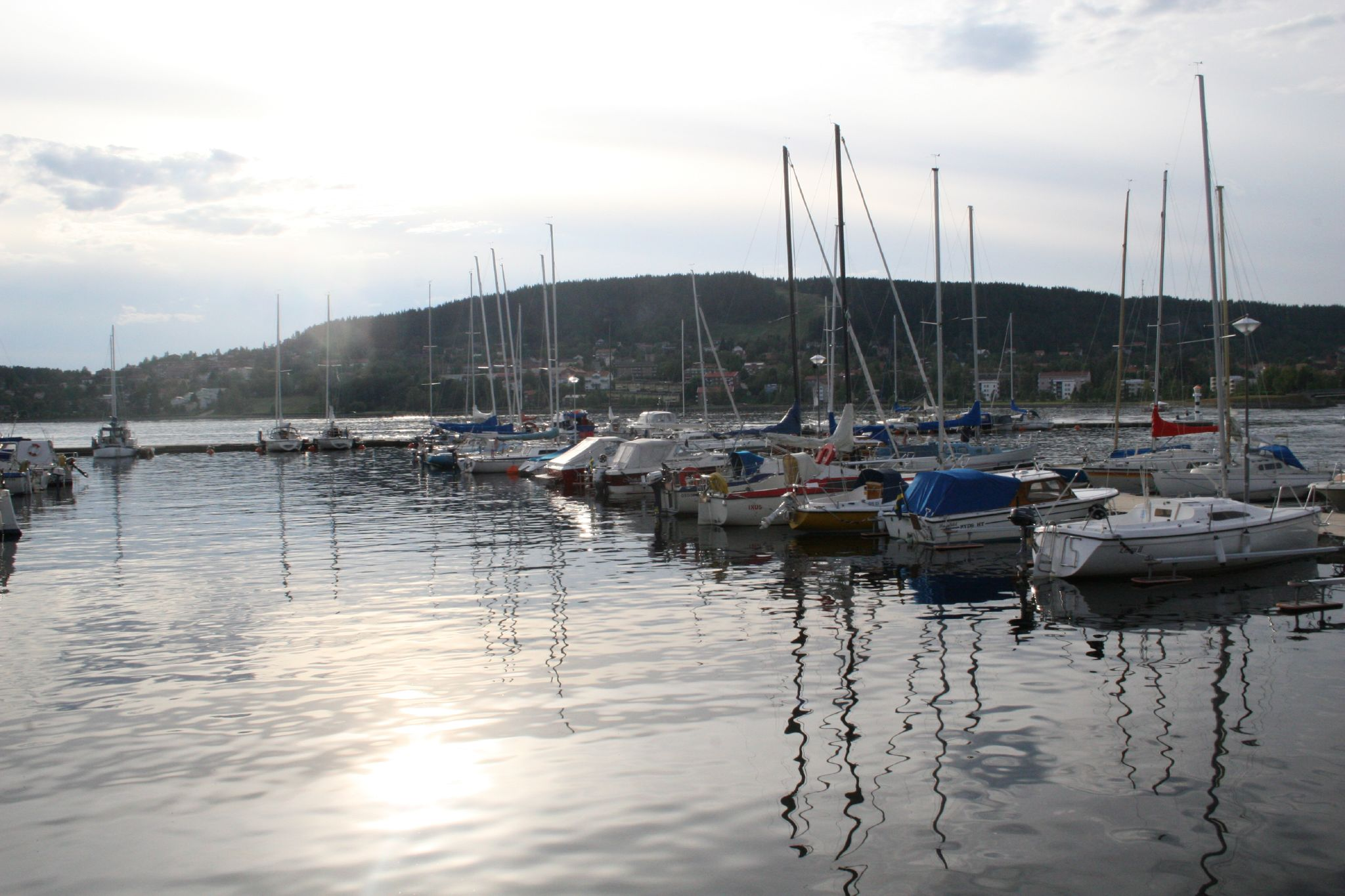 Harbour in Östersund